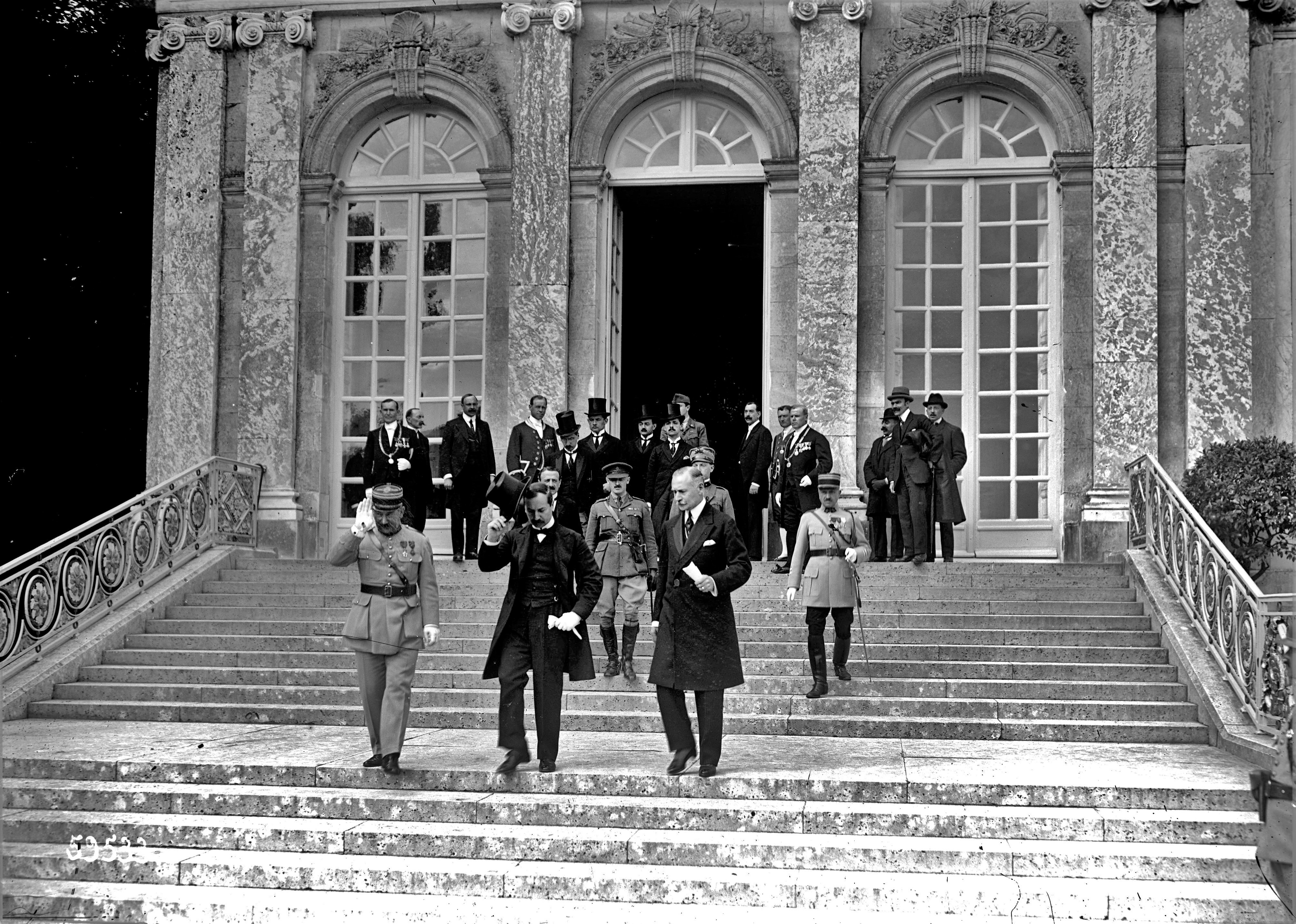 1920. június 4-én néhány perccel a trianoni békeszerződés aláírása után Benárd Ágost küldöttségvezető (középen, balra cilinderrel a kezében) és Drasche-Lázár Alfréd rendkívüli követ és államtitkár (jobbra fedetlen fővel) elhagyja a versailles-i Nagy Trianon kastélyt.